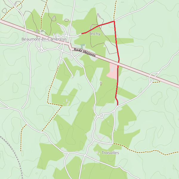 Secteur pavé de Troisvilles à Inchy